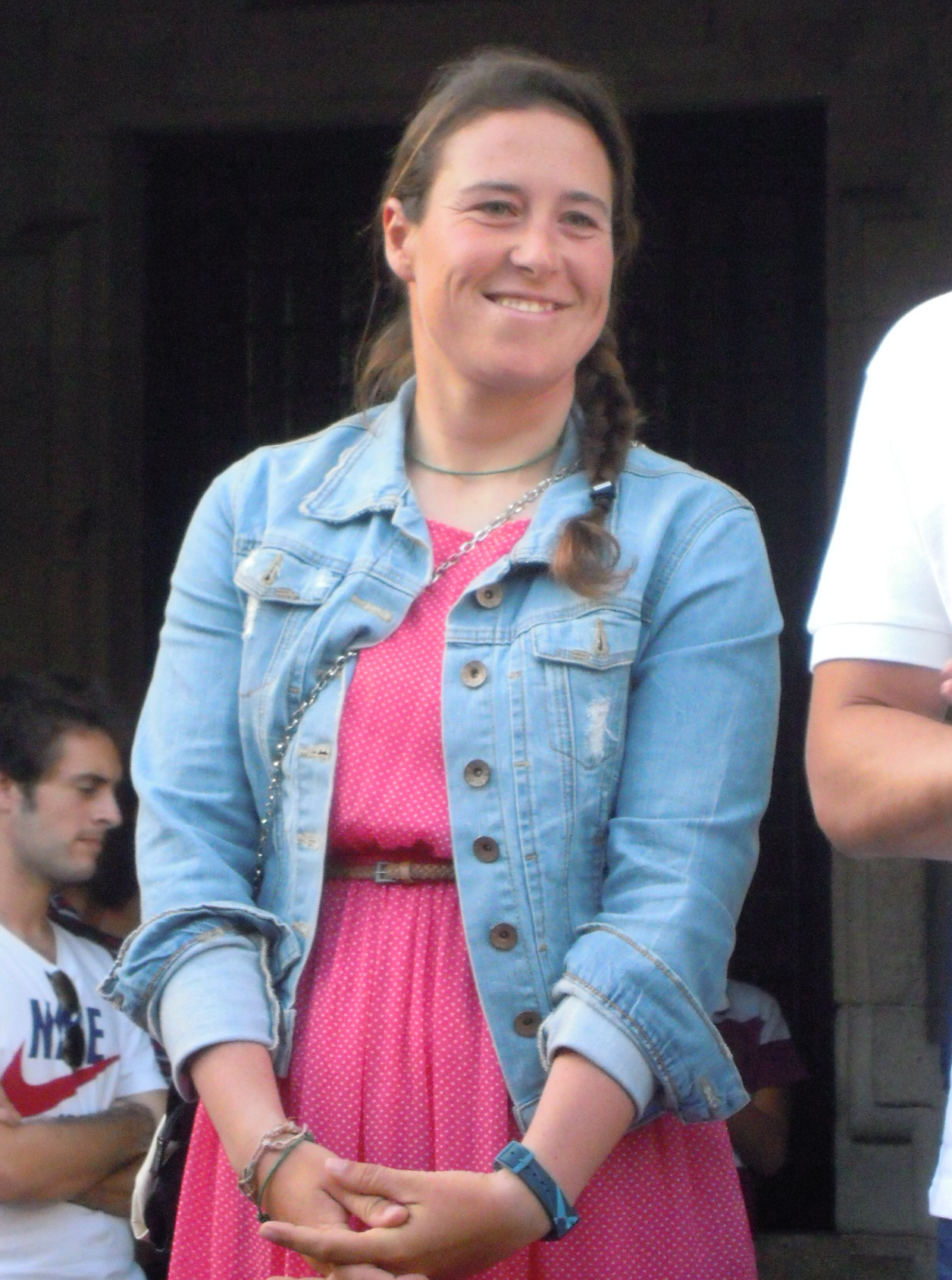 Tamara Echegoyen na benvida organizada polo concello de Pontevedra aos cinco Galegos nos Xogos Olímpicos de 2012 vinculados á vila